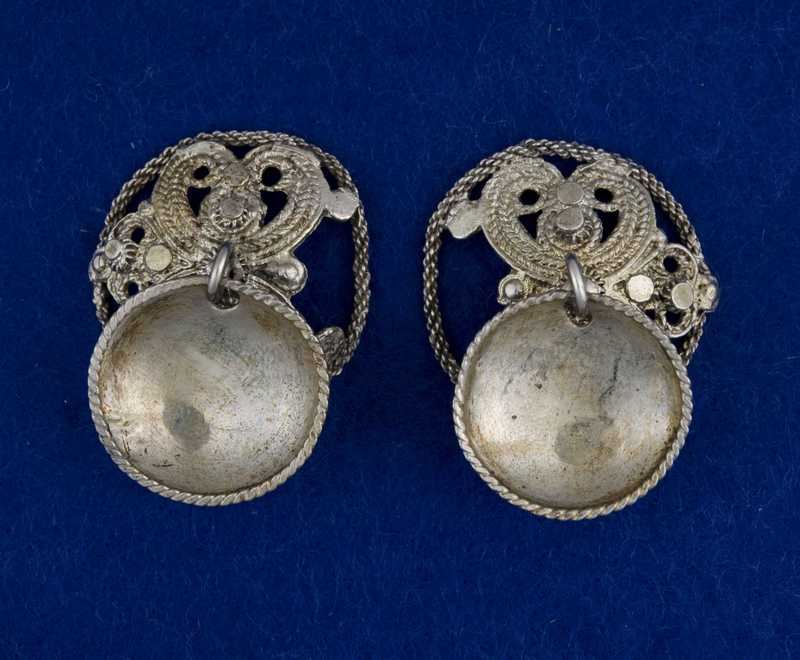 Maljer i sølv, filigransarbeid fra Telemark, innkjøpt i 1906. Foto Anne-Lise Reinsfelt / Norsk Folkemuseum, NF.1906-1655.